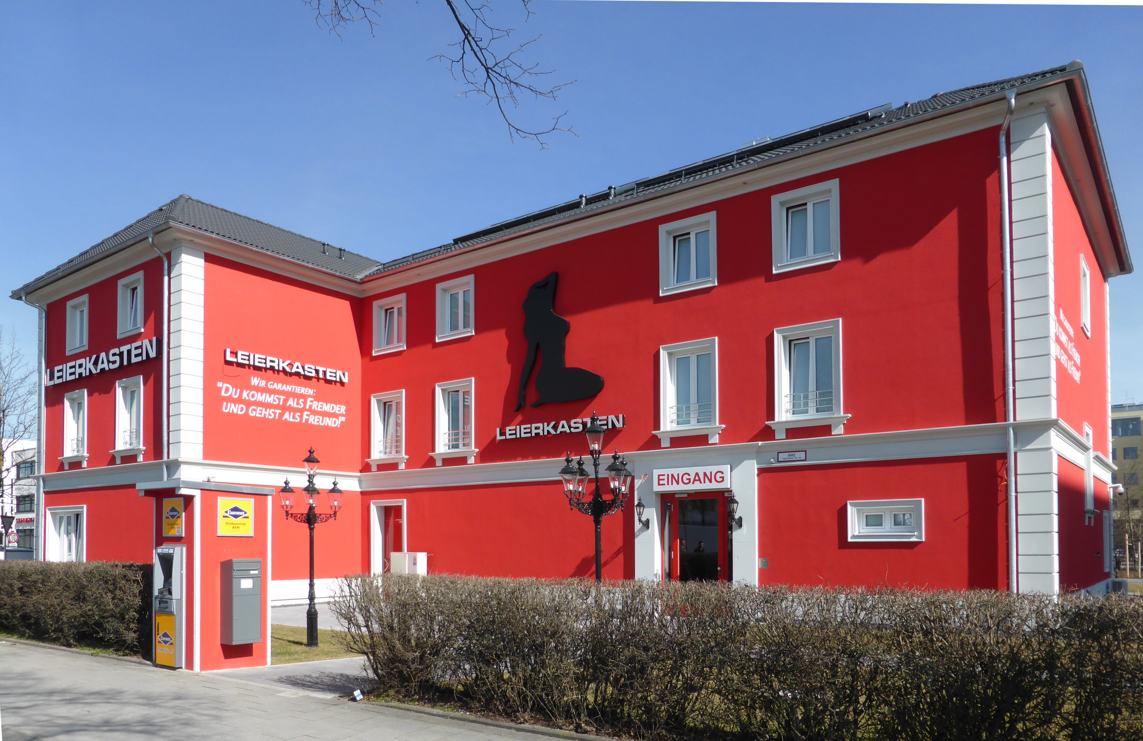 Der Leierkasten, ein Nachtlokal und Bordell im Norden Münchens.